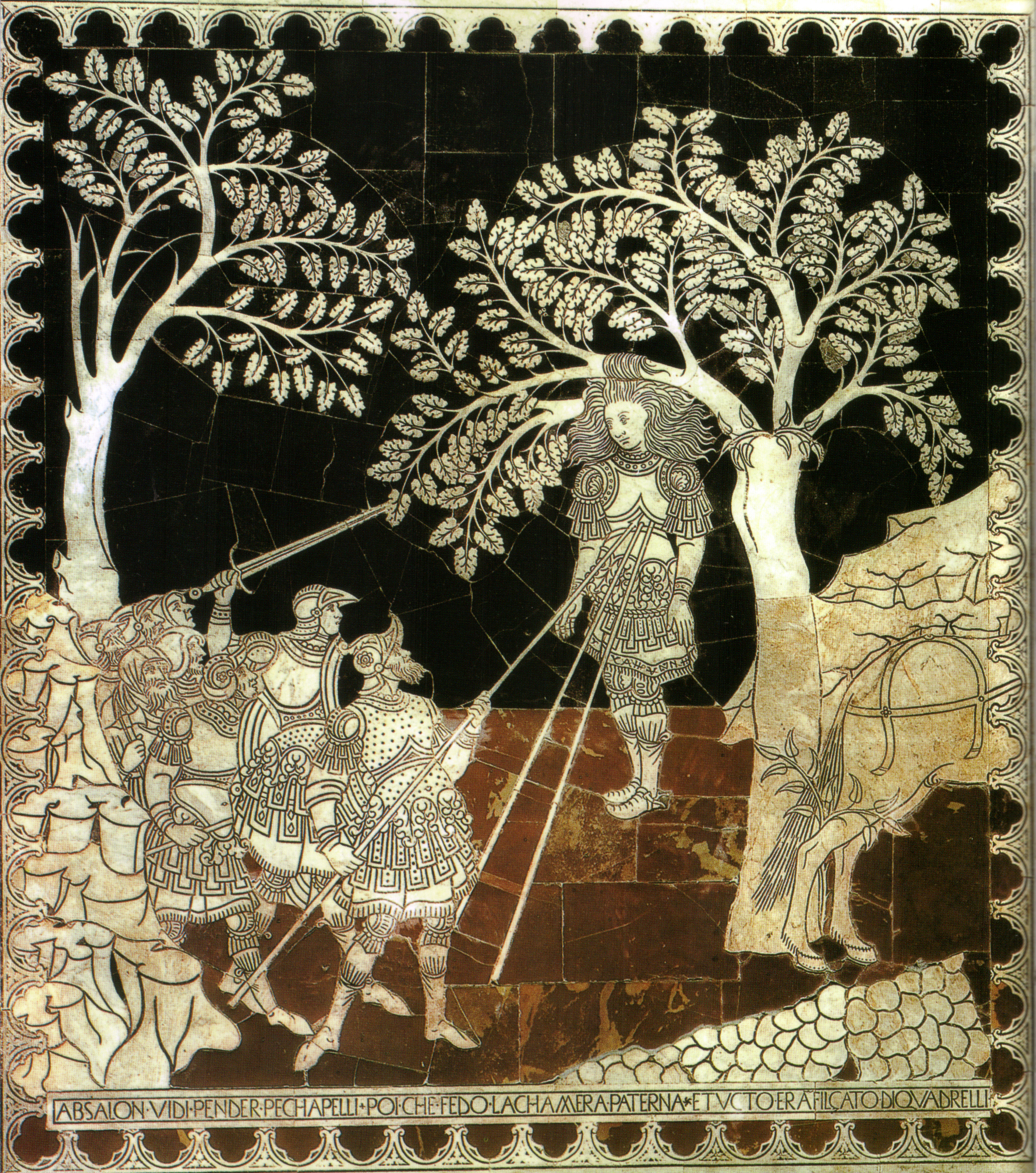 Pavimento di siena, storie di assalonne (piero del minnella)